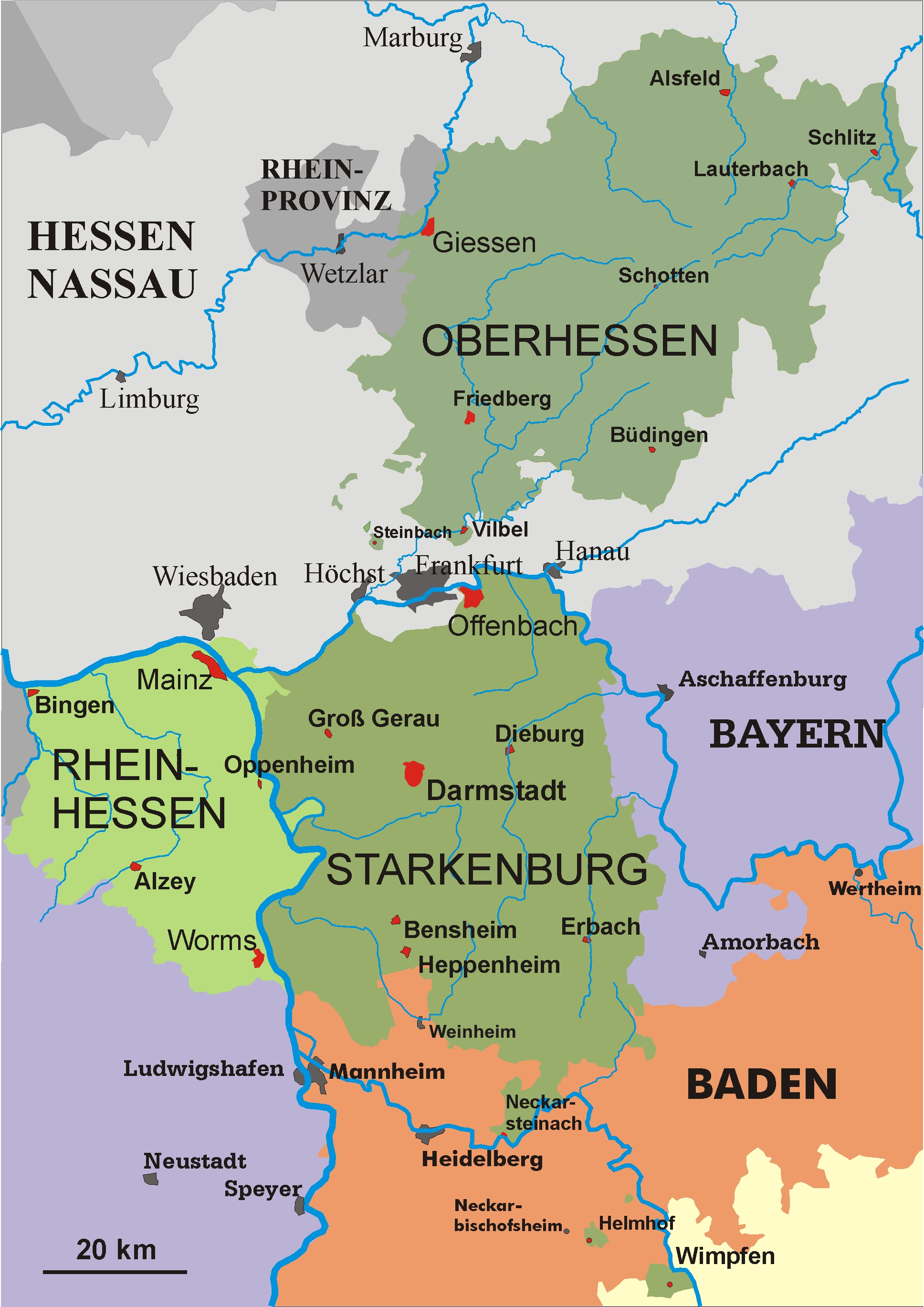 Karte Hessen 1930 selbst gezeichnet gemeinfrei